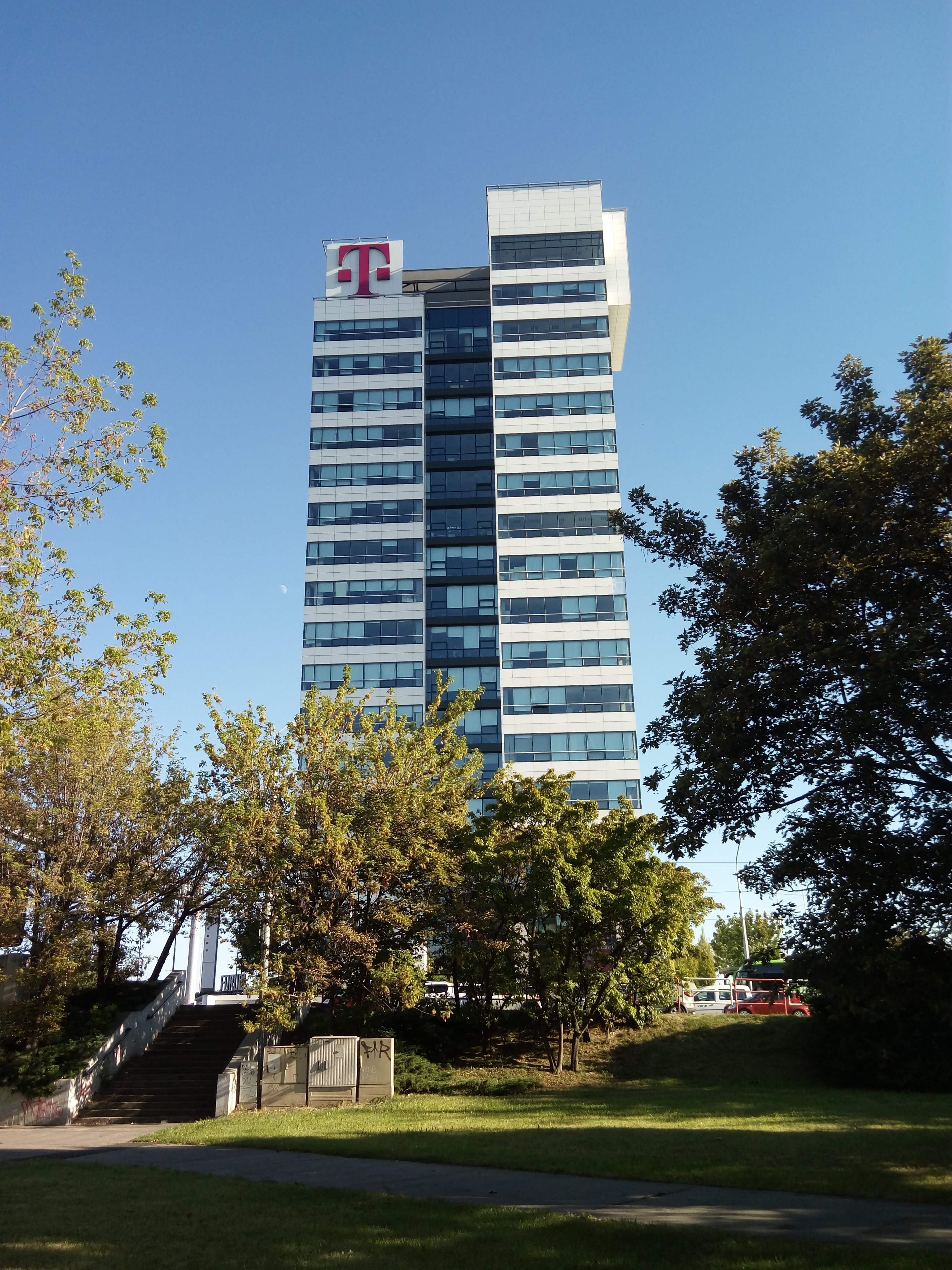 Forum Business Center, Bajkalská 28, Ružinov, Bratislava